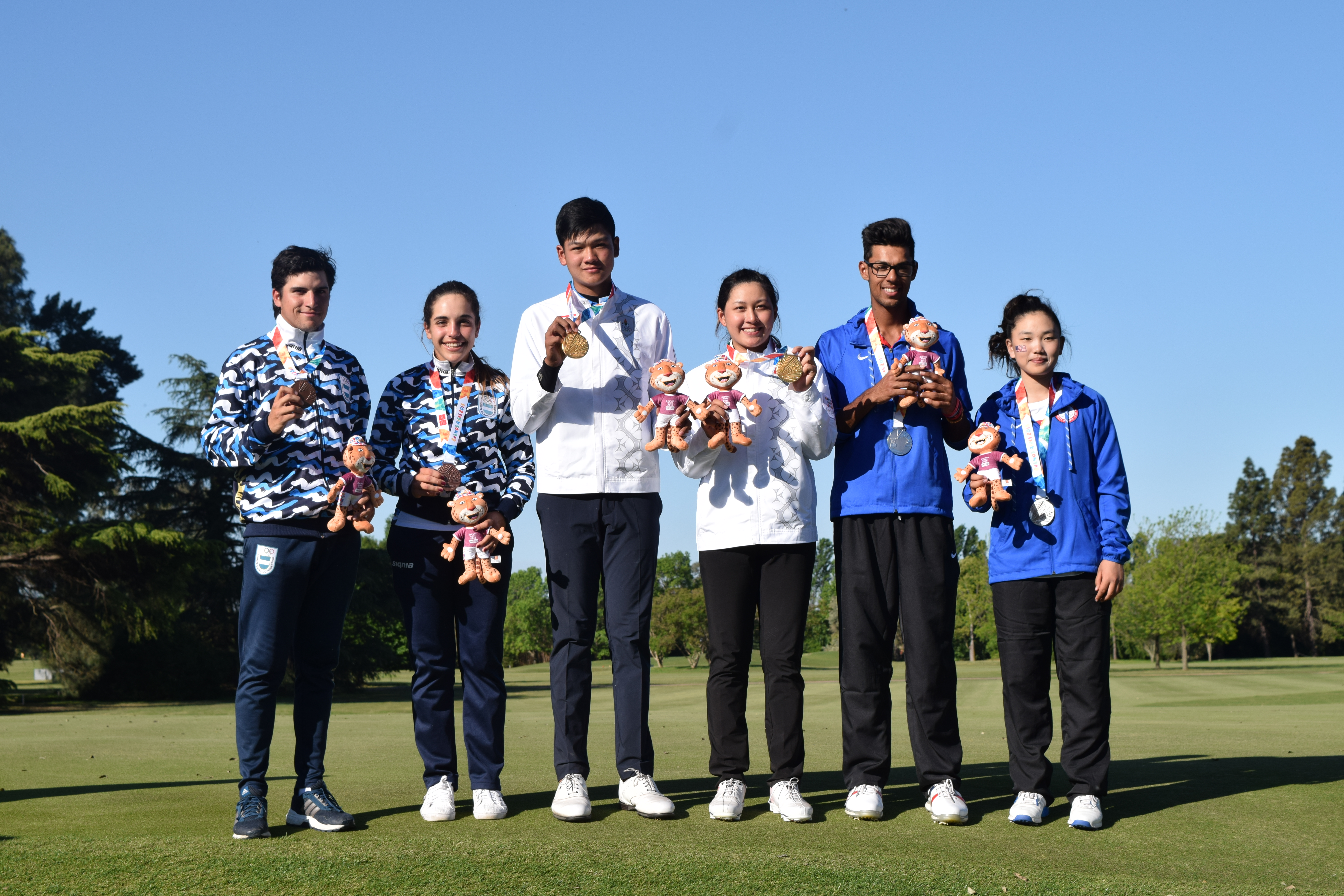 Ceremonia de medallas de los equipos de golf mixtos, durante los Juegos Olímpicos de la Juventud 2018 en Buenos Aires. Lucy LI, Akshay BHATIA, Atthaya THITIKUL, Vanchai LUANGNITIKUL, Mateo FERNANDEZ de OLIVEIRA y Ela ANACONA.